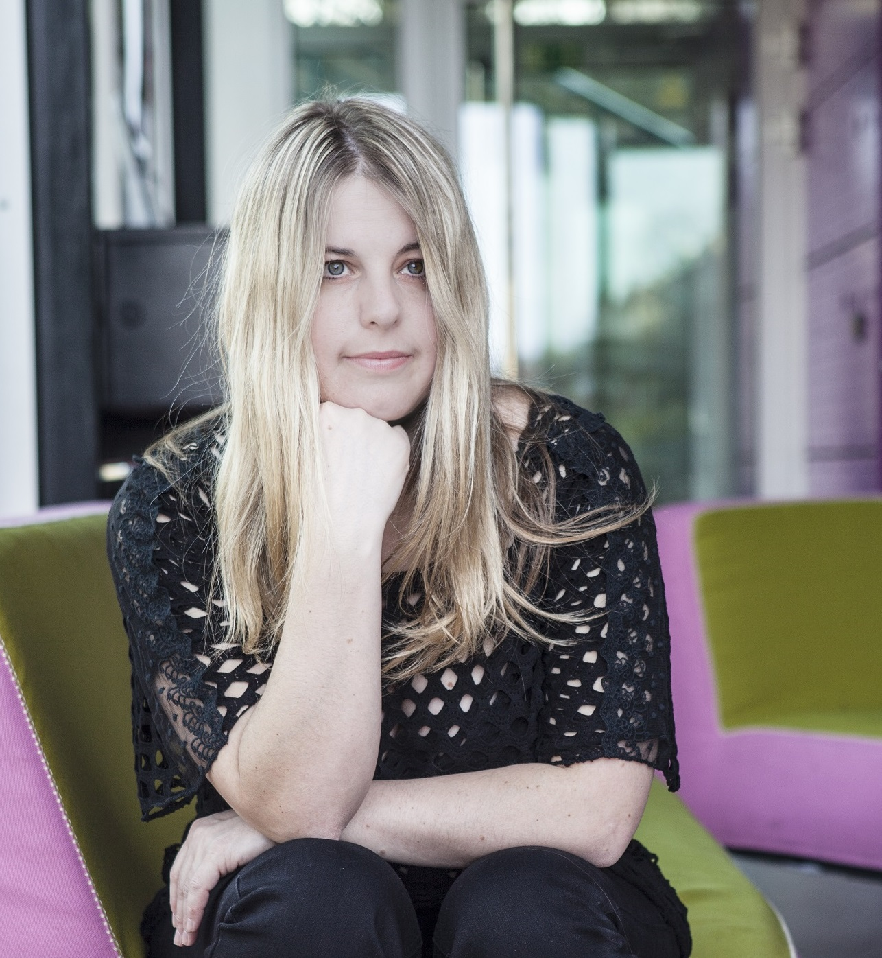 Ivana Fitznerová